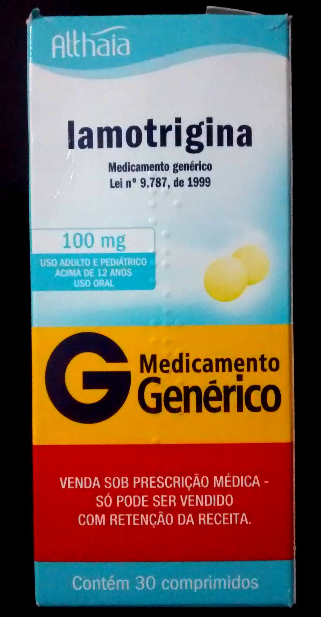 Caixa com 30 comp. de lamotrigina de 100 mg.